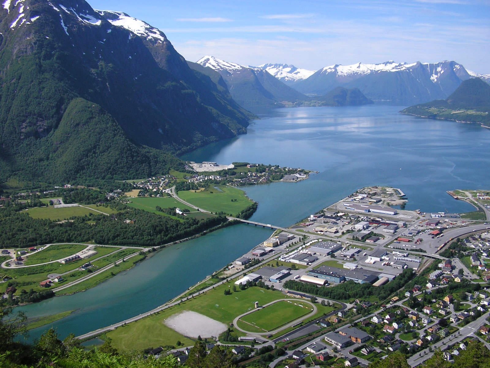 Utsikt over utløpet av elva Rauma fra Kjerringplassen.